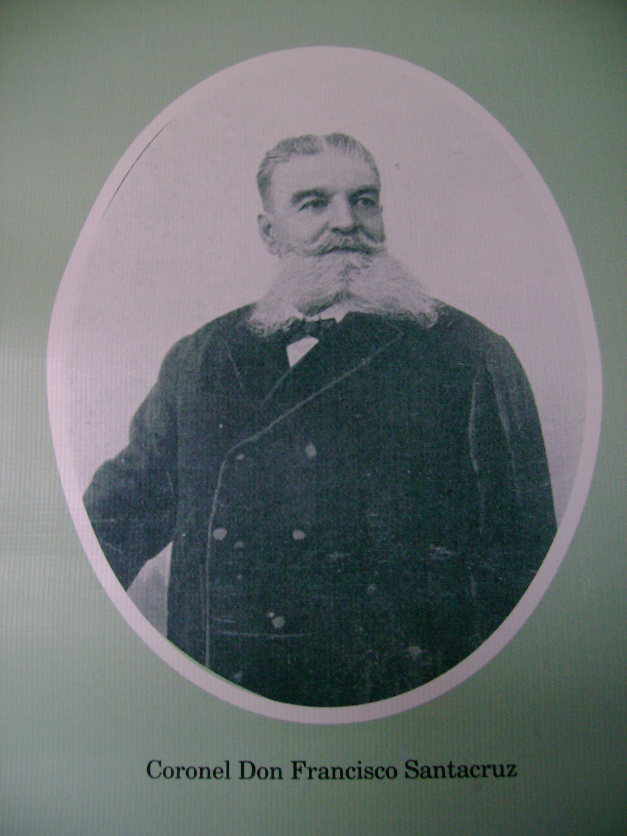 Coronel Francisco Santa Cruz, gobernador de Colima.